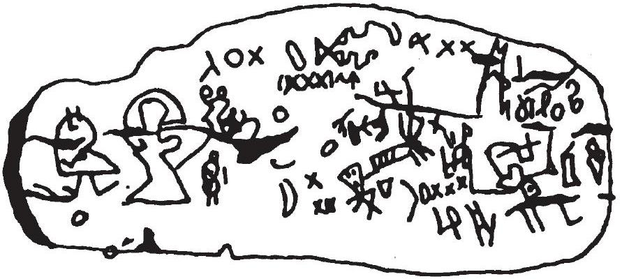 Dibujo de la Roca de Dighton (tomado de )